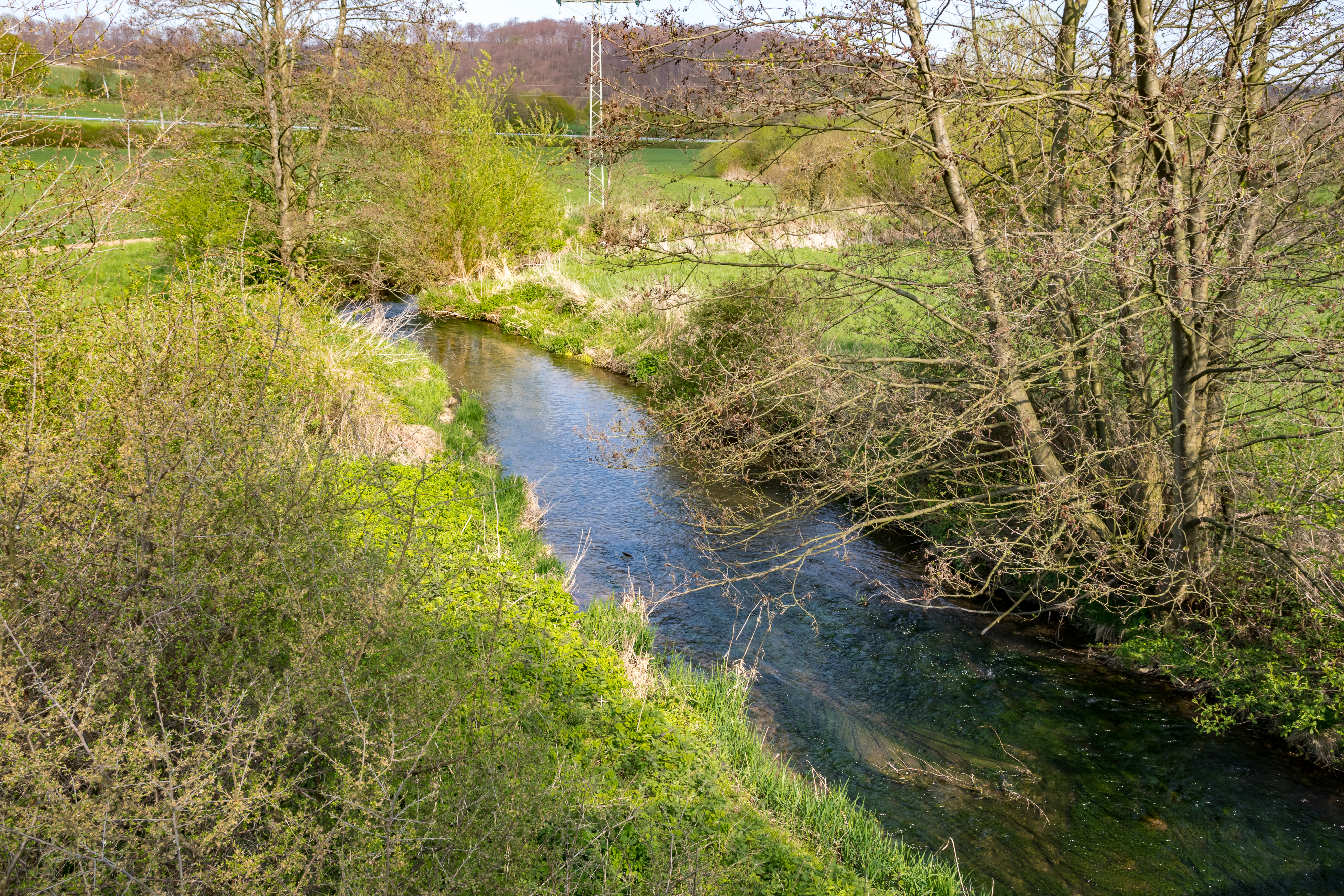 Naturschutzgebiet Nethe östlich von Willebadessen, Kreis Höxter